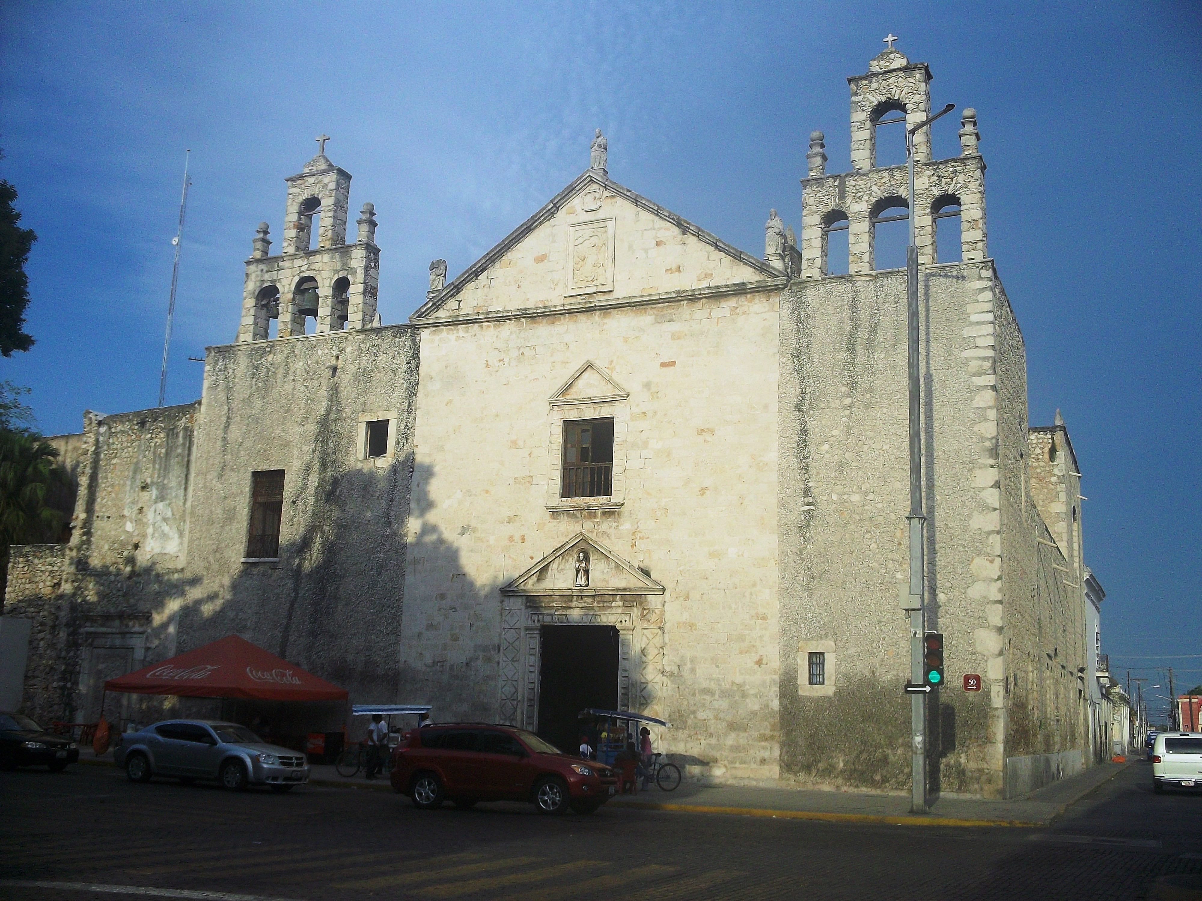 Iglesia de Nuestra Señora del Tránsito de Mejorada, Mérida, Yucatán.